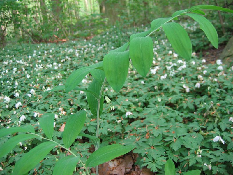 Vielblütige Weißwurz Polygonatum multiflorum, Nähe Rostock